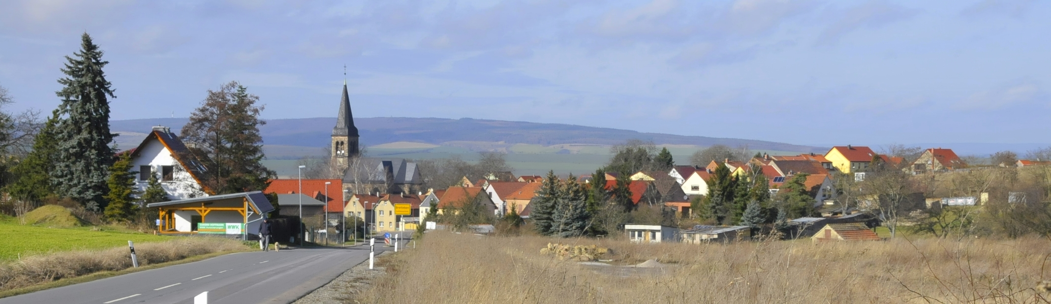 Bretleben